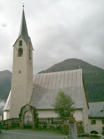 reformierte Kirche Guarda